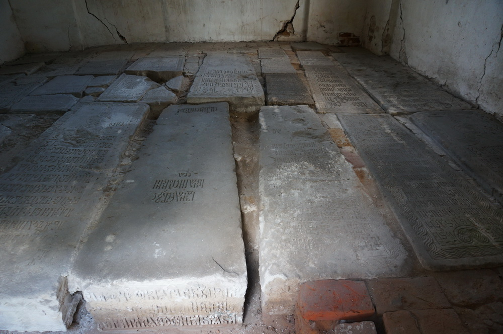 Часовня-усыпальница Строгановых (Архангельская область, Сольвычегодск, Музейный переулок)